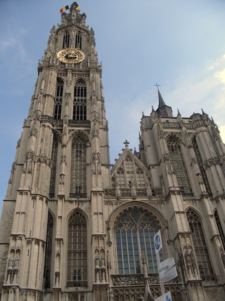 Catedral d'Anvers